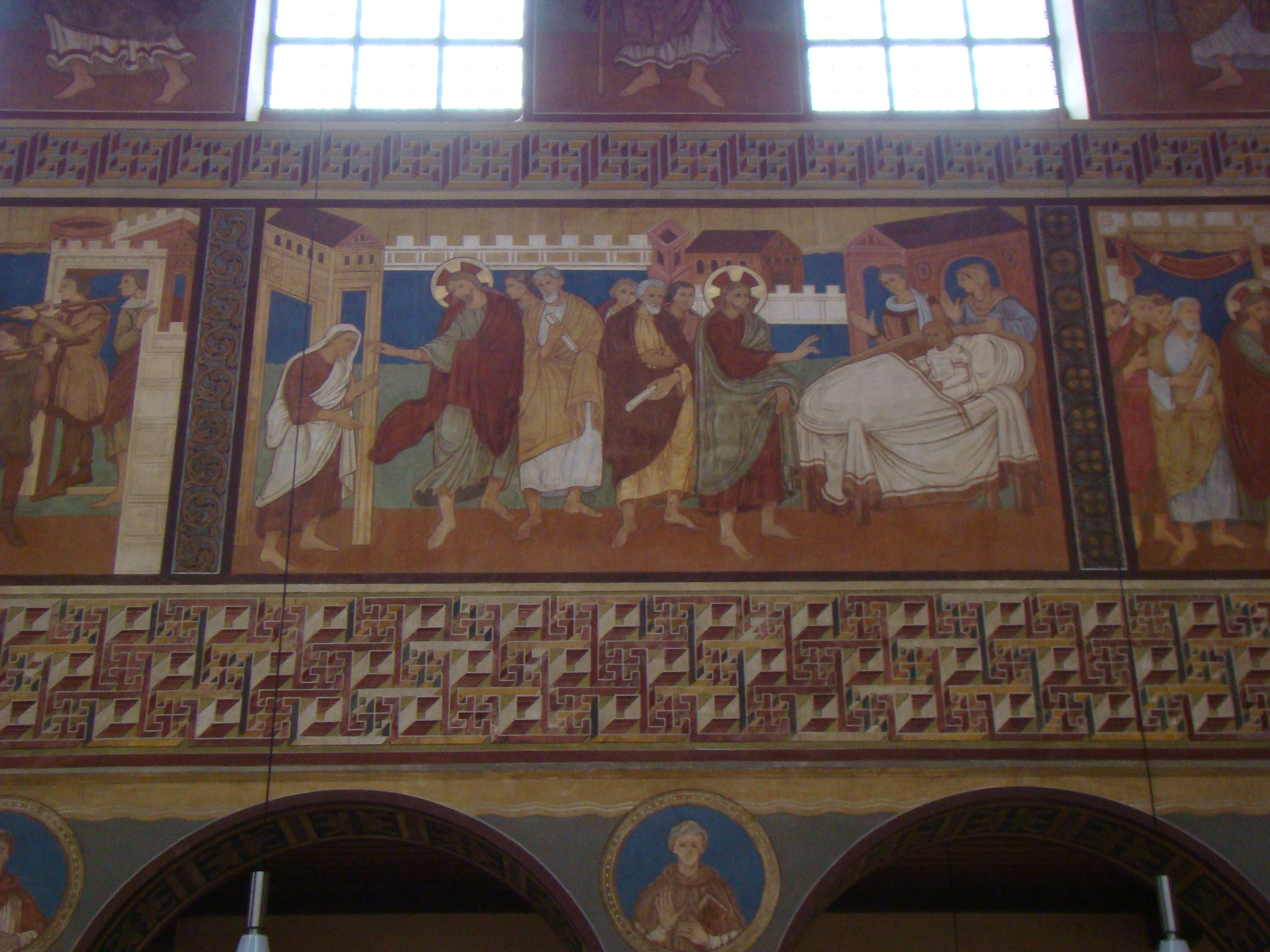 St. Georg in Elztal-Rittersbach